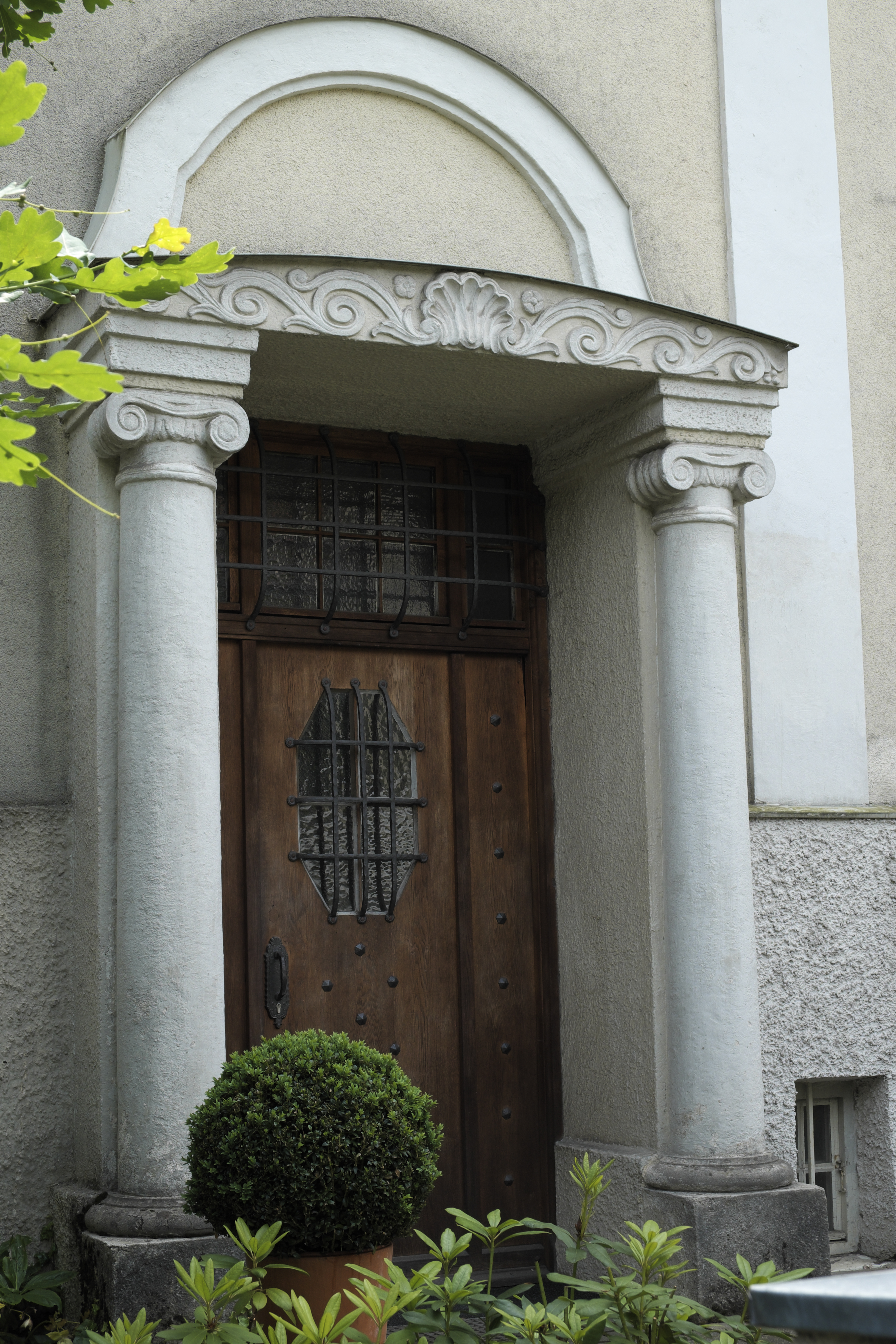 Rembrandtstraße 7 in Pasing im Stadtbezirk Pasing-Obermenzing in München (Bayern/Deutschland)